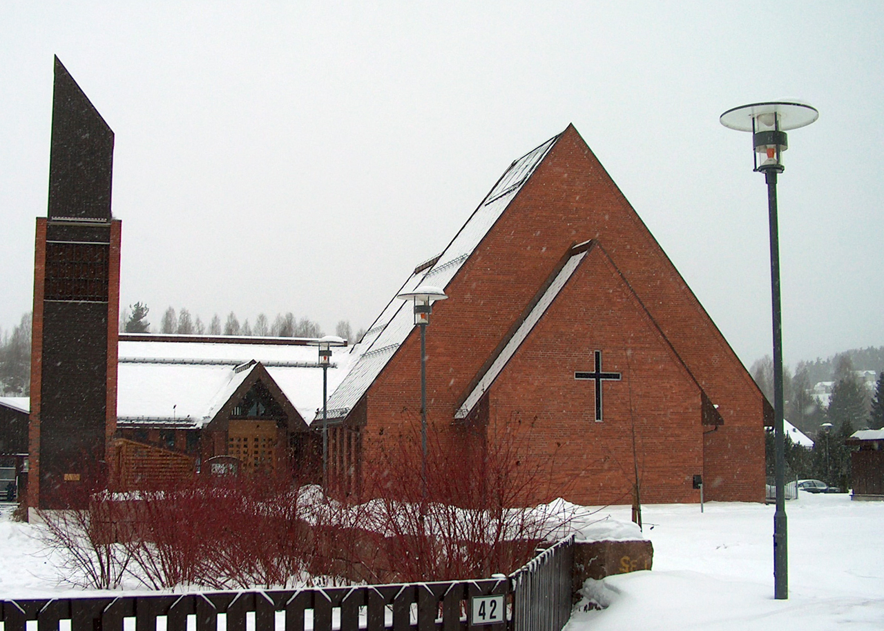 Ullerål kirke (Ullerål Church, Ringerike, Buskerud, Norway), east view